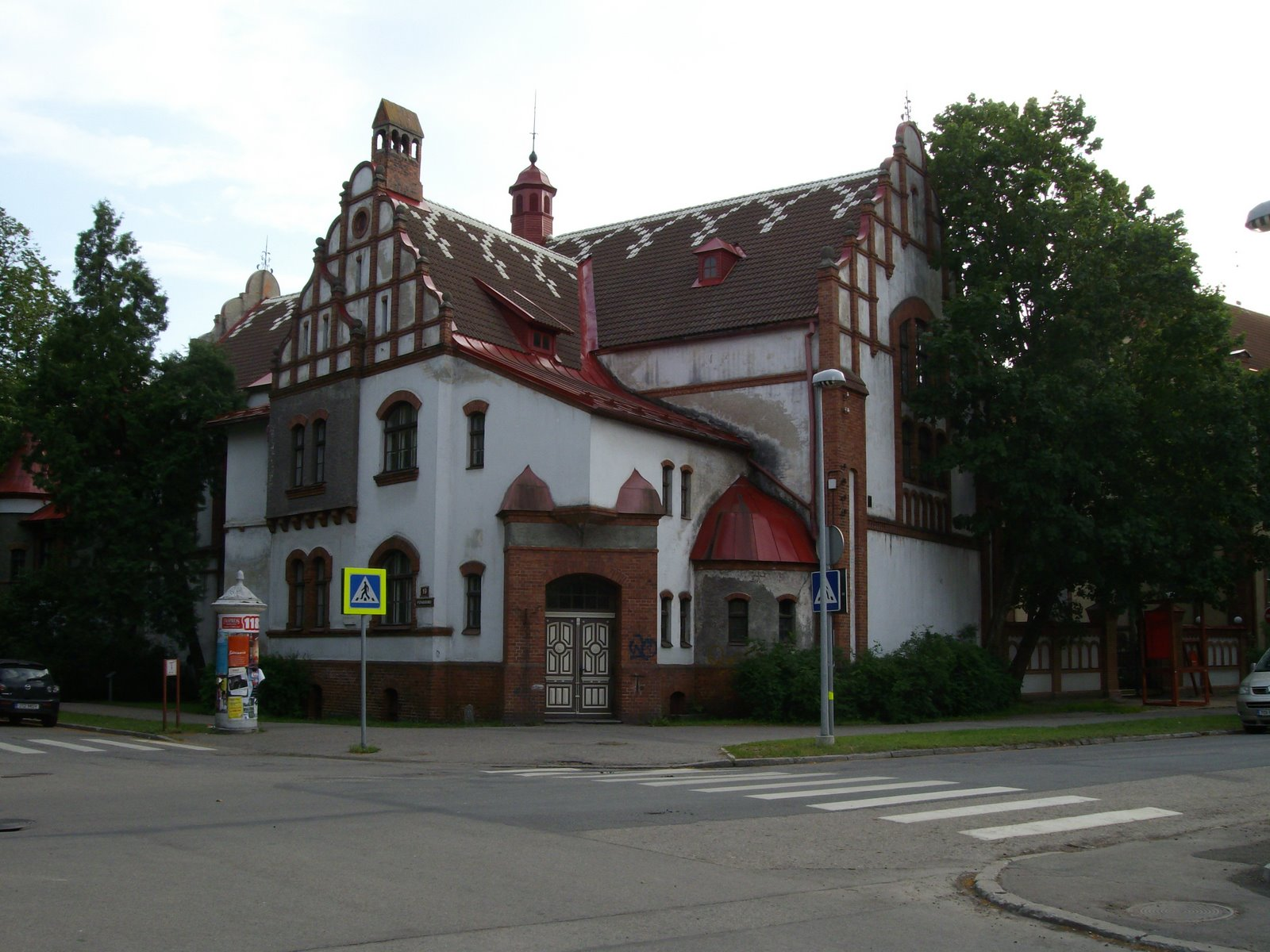 Võimla Pärnus Pühavaimu tn 19